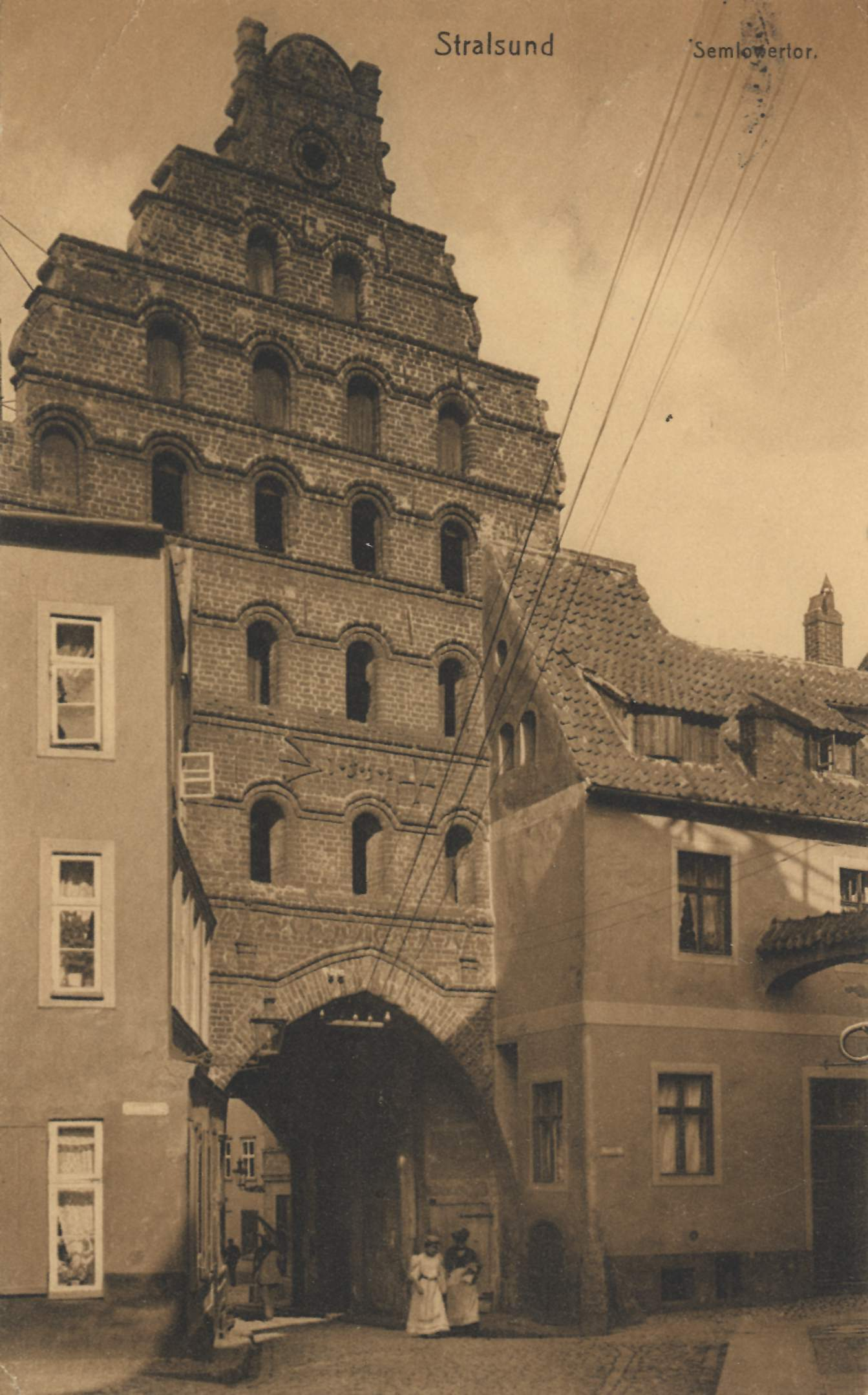 Das ehemalige Semlower Tor in Stralsund, Teil der alten Stadtbefestigung. Postkarte von 1910. Das Semlower Tor, eines der Seetore, wurde erstmals 1277 urkundlich erwähnt, also noch vor der erstmaligen Erwähnung der Stadtmauer. Es befand sich am seeseitigen Ende der Semlower Straße zur Wasserstraße hin. Es war 13,30 Meter breit, 17 Meter tief und 22,65 Meter hoch und wurde zu Wohnzwecken und als Speicher für Getreide genutzt. Im Jahr 1599 wurde es umgebaut. Im Zweiten Weltkrieg wurde es in der Bombennacht vom 6. Oktober 1944 stark beschädigt. Nach dem Krieg eine Ruine, wurde lange über die weitere Nutzung diskutiert. Da der DDR bzw. der Stadt Stralsund Gelder für einen Wiederaufbau zu dieser Zeit fehlten, wurden die Reste des Tores trotz Protesten am 29. Juni 1960 gesprengt. Reste des Tores wurden in einem anliegenden, im Jahr 1998 sanierten Haus integriert und sichtbar gemacht.